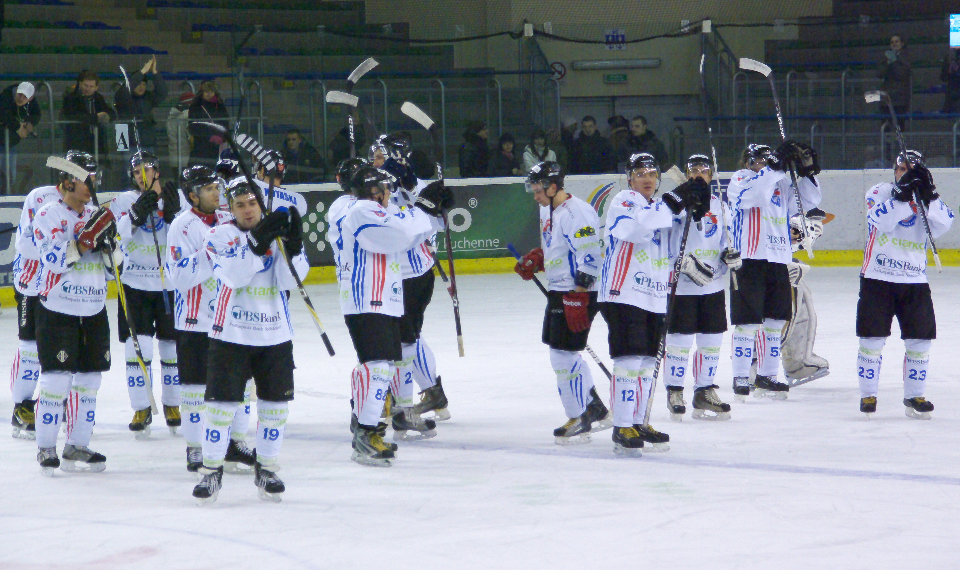 Drużyna Ciarko PBS Bank KH Sanok po meczu z Zagłębiem Sosnowiec 10 lutego 2012)